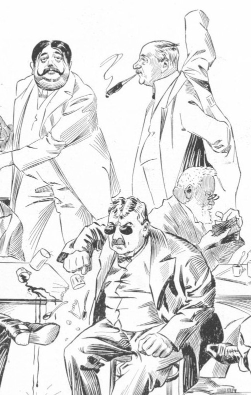 Zygmunt Skwirczyński Alfred Maria Willner 1911; links Heinrich Reinhardt (Komponist); rechts am Tisch Bernhard Herzmansky (senior) ; vorne am Tisch Wallner